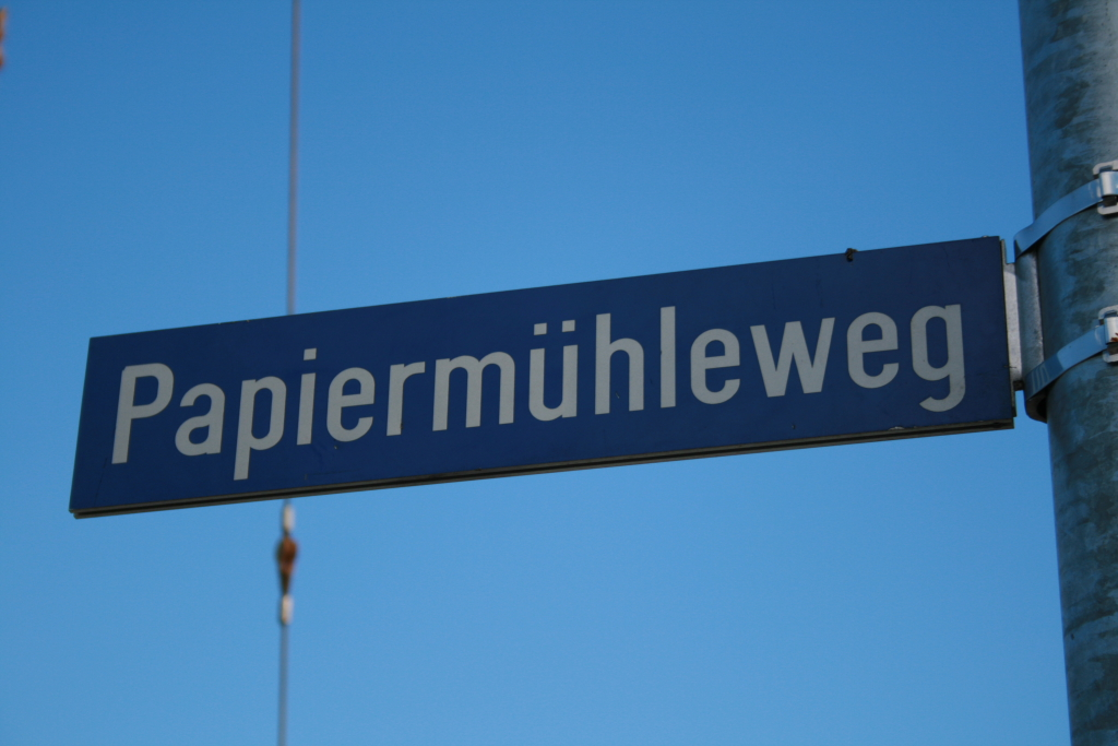 Strassenschild in Landquart